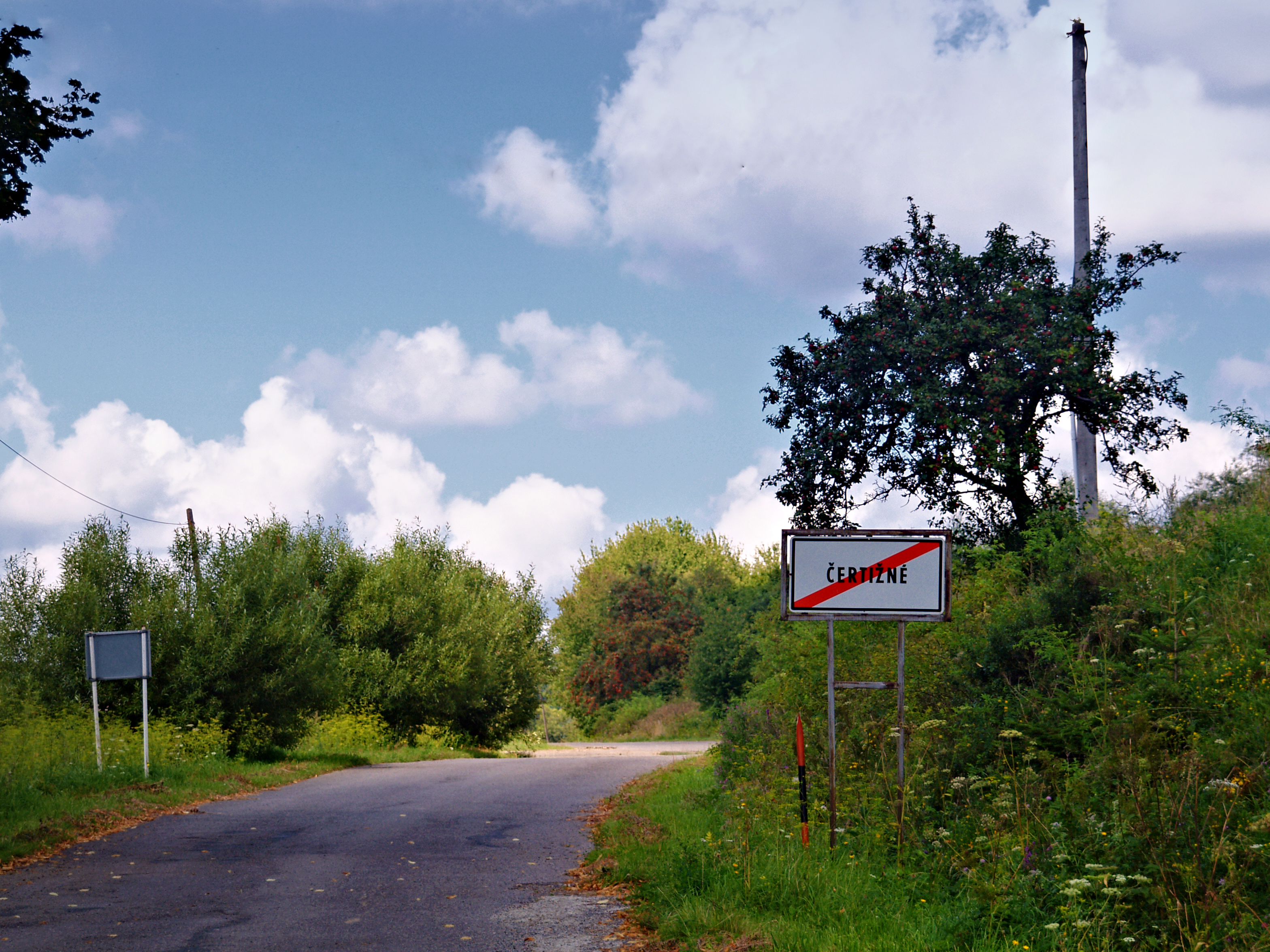 Čertižné (District de Medzilaborce - Prešovský kraj) - Panneau d'agglomération